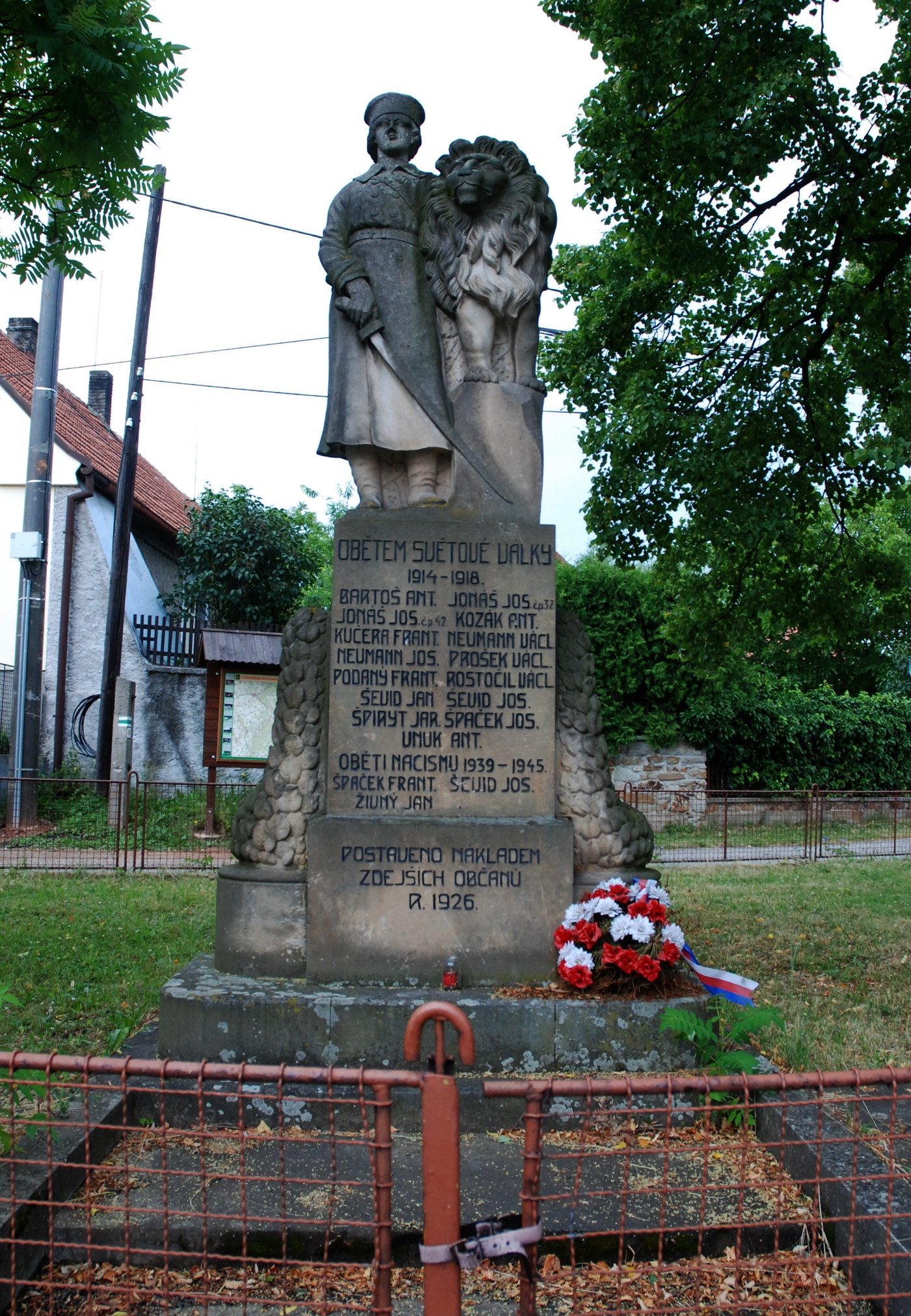 Pomník obětem I. světové války v Malých Přílepech